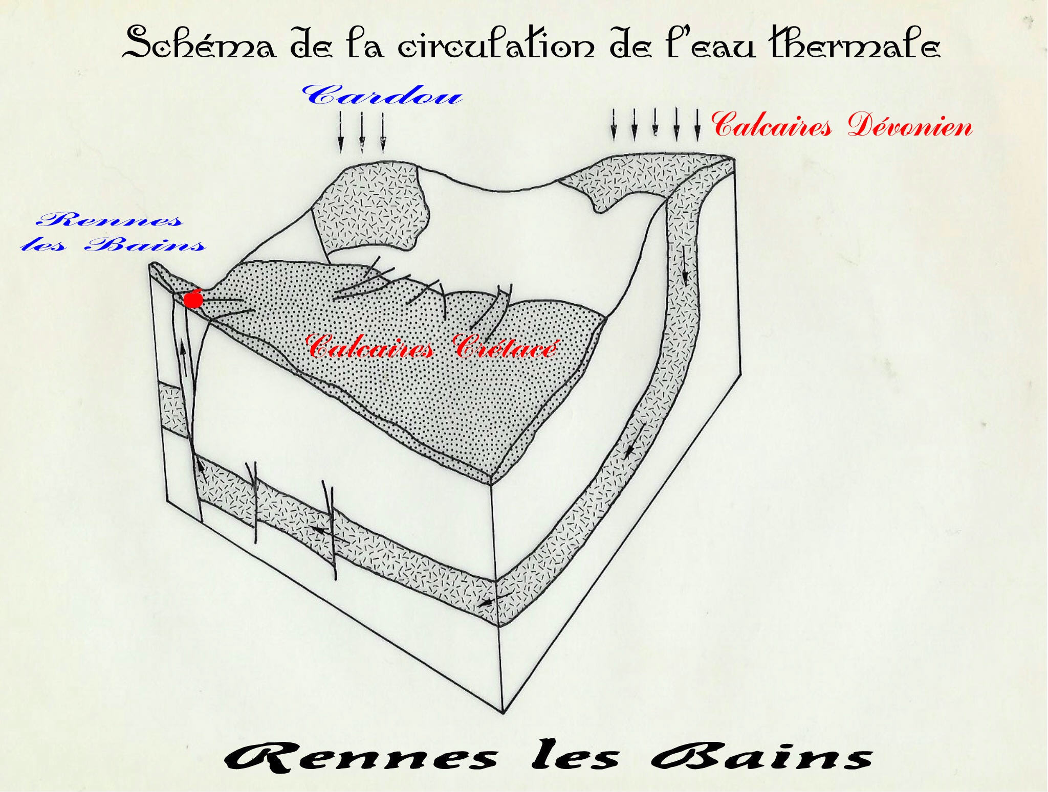 ORIGINE EAU THERMALE DE RENNES LES BAINS